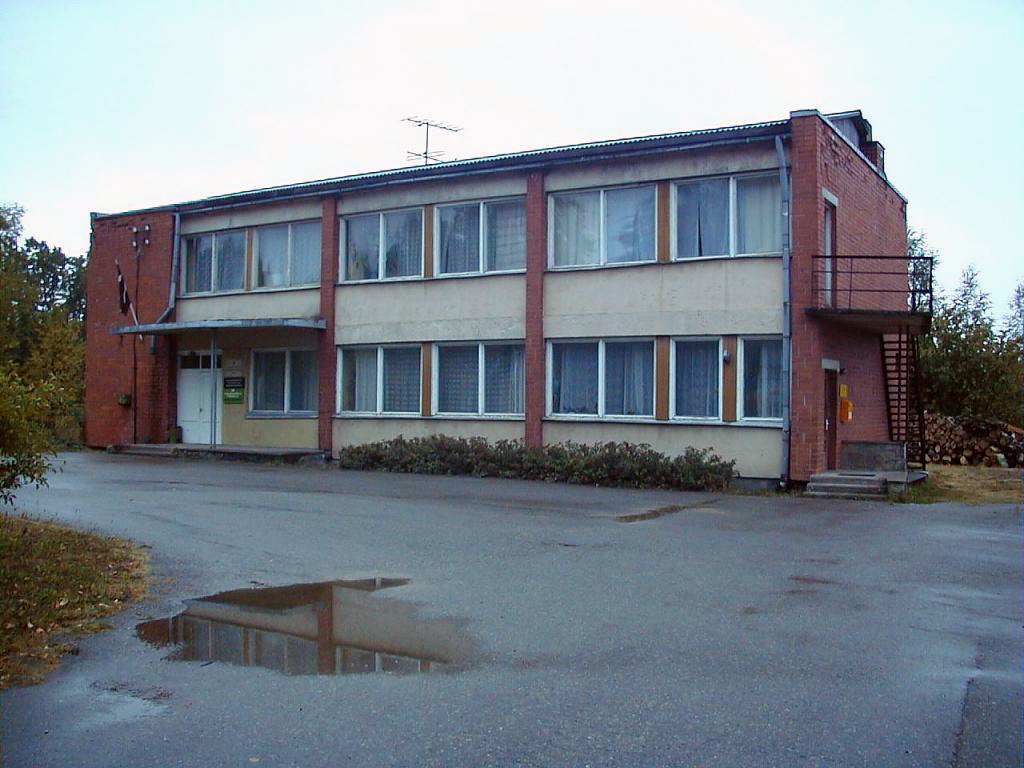 Kalncempju pagastnams 2002-09-14